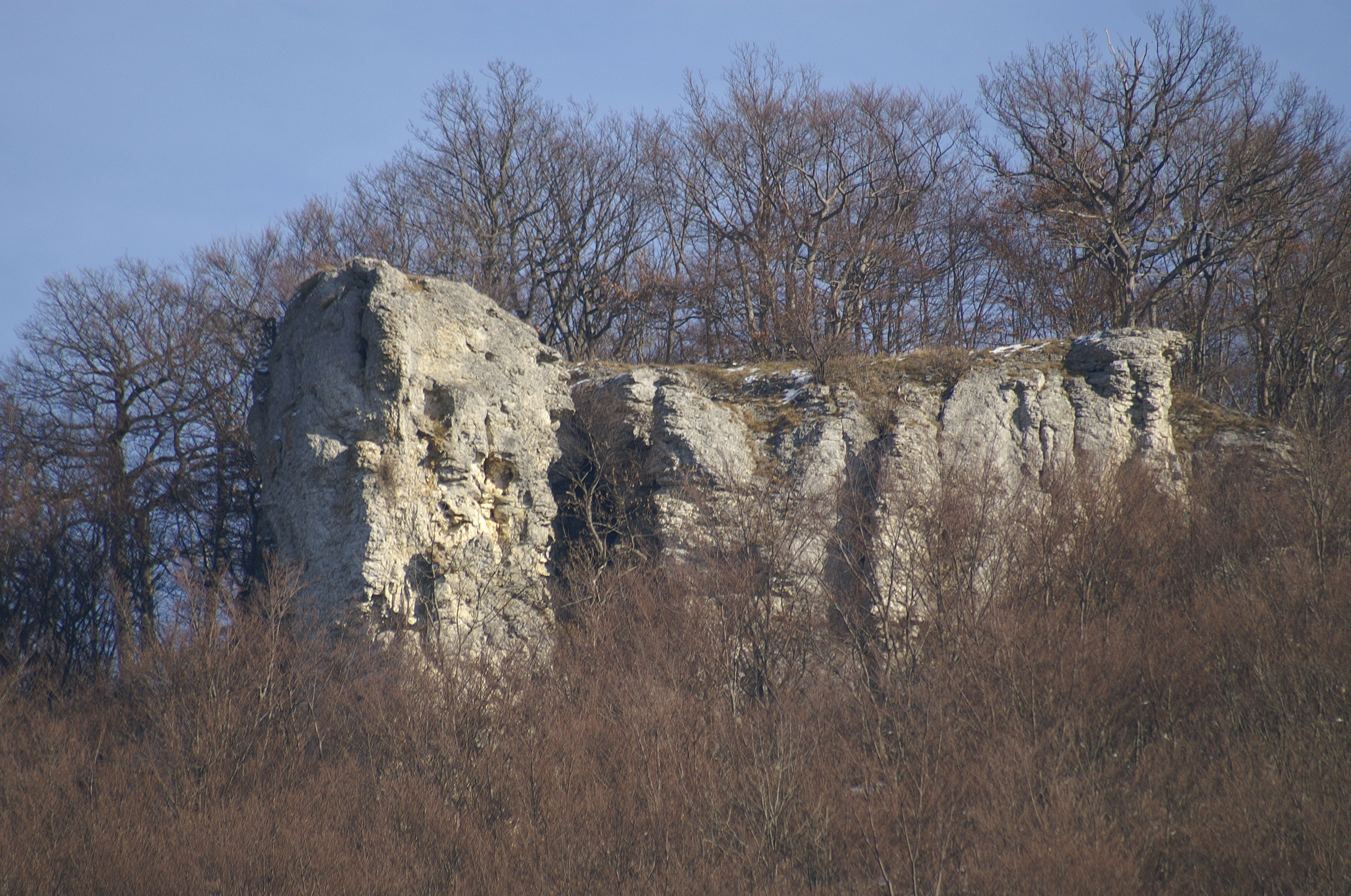 Der Tiersteinfels ist ein geschütztes Geotop im Landkreis Göppingen